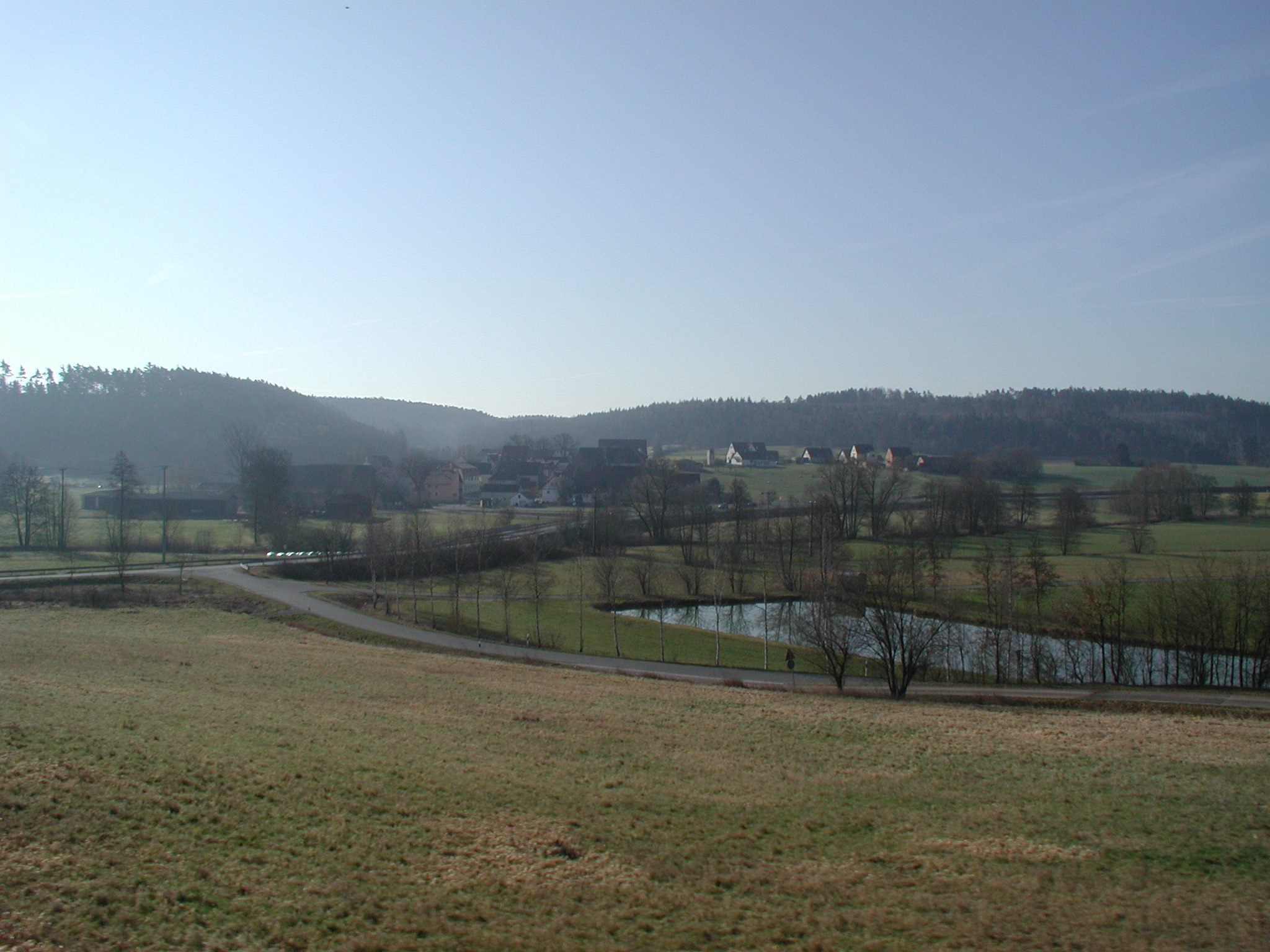 Adelsdorf (Neuhof an der Zenn)